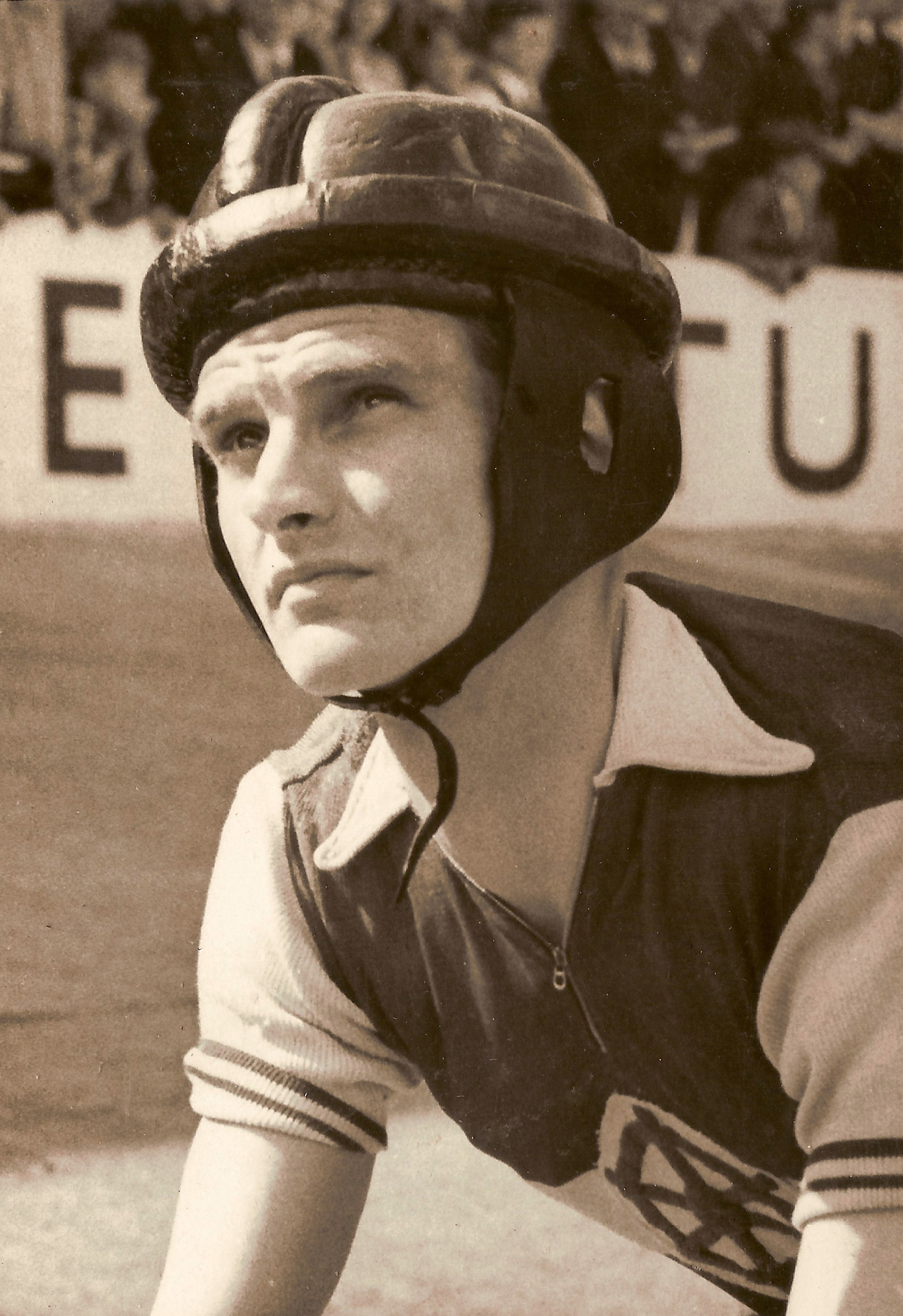 Rudi Keil auf der Radrennbahn Andreadried Erfurt